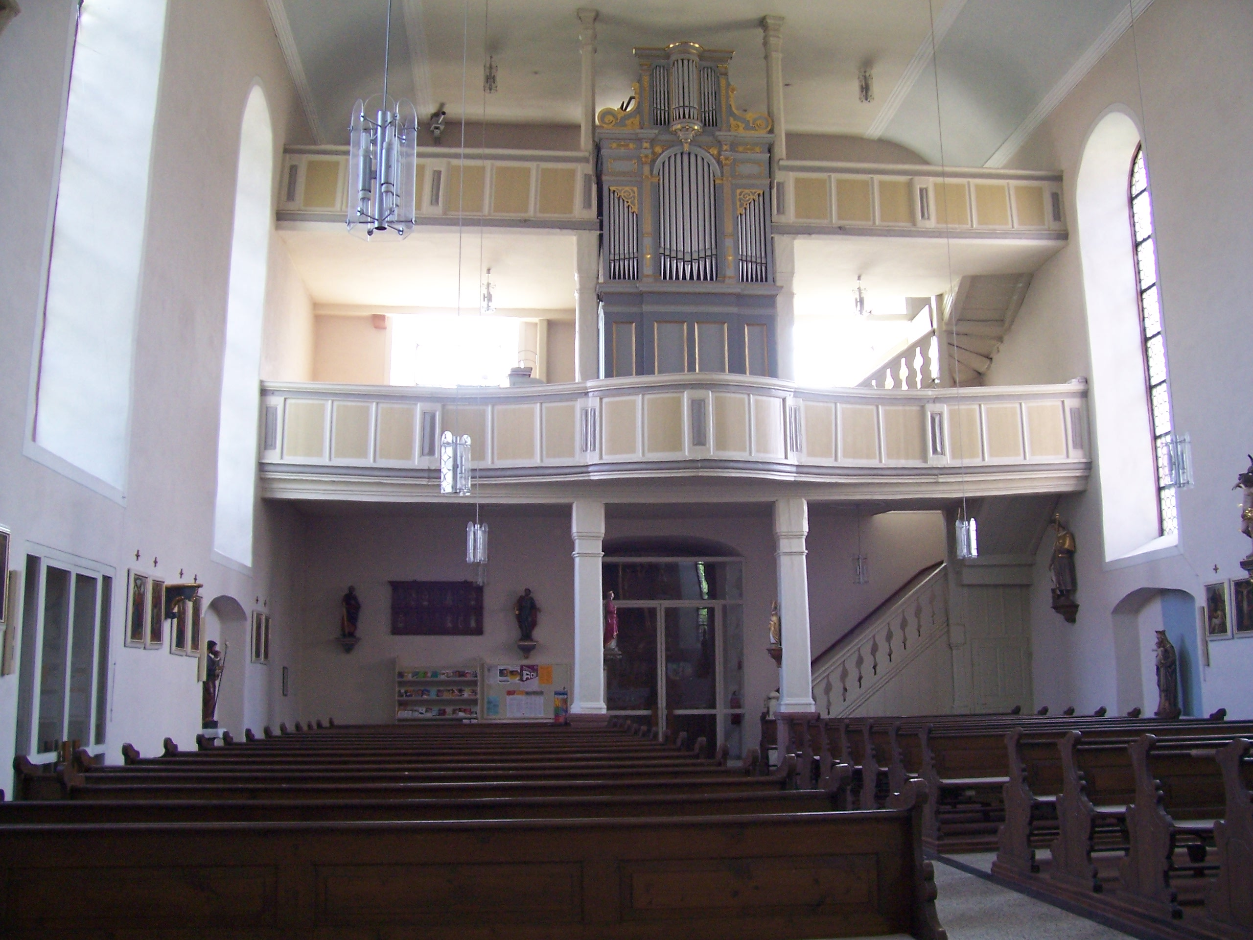 Empore von St. Laurentius in Dittwar (Tauberbischofsheim)